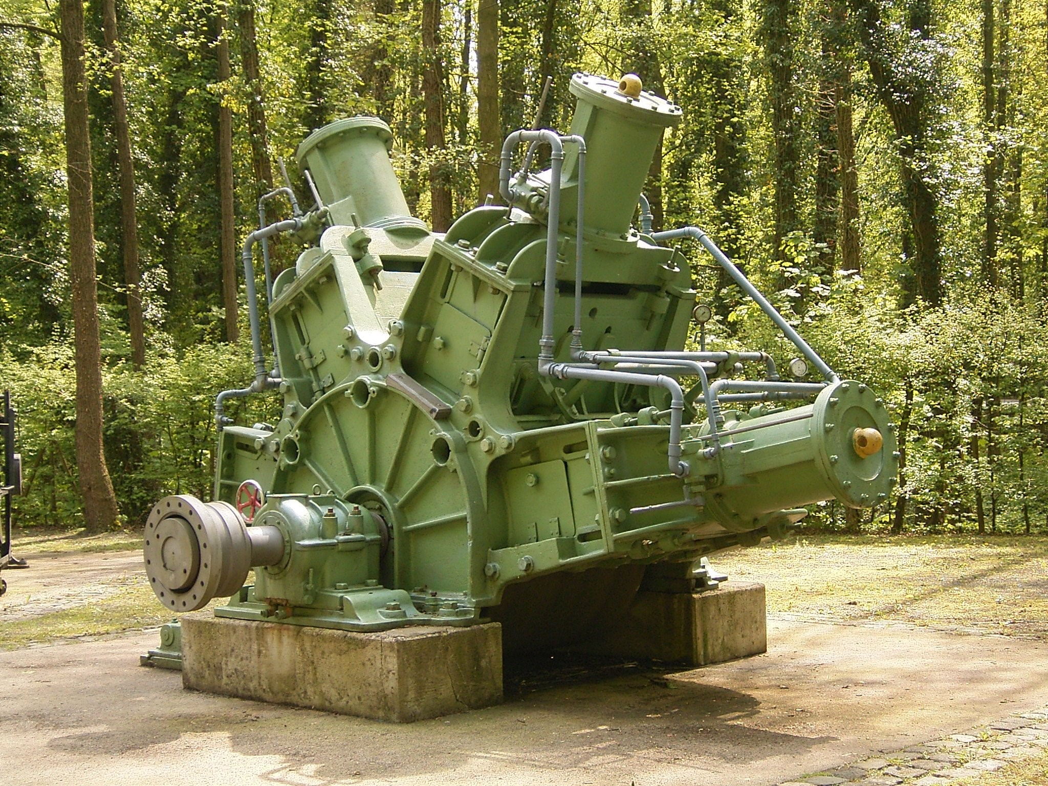 Holzschleifmaschine der Papiermühle Alte Dombach in Bergisch Gladbach